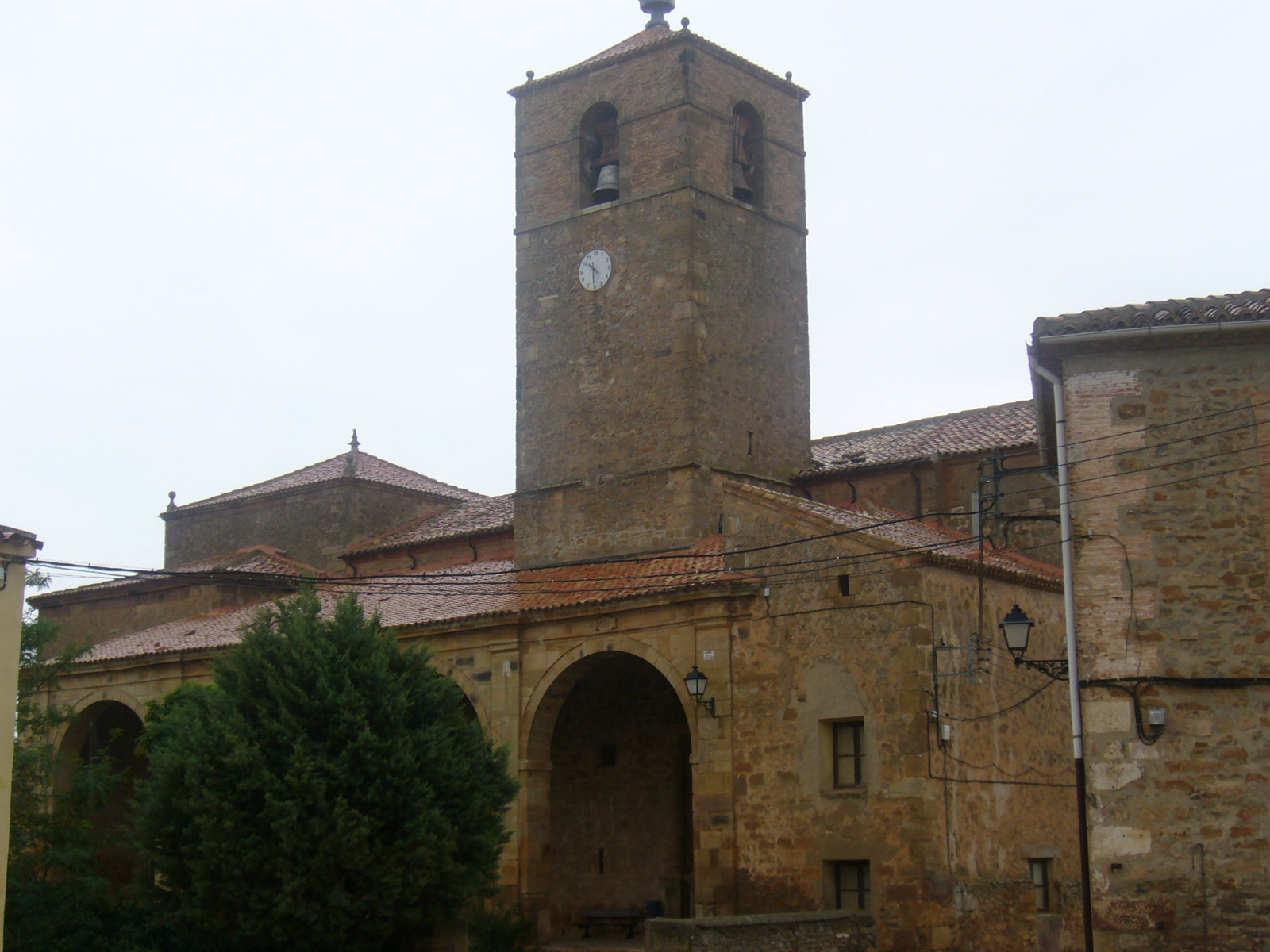 Iglesia de los Santos Justo y Pastor de Noviercas, Soria.